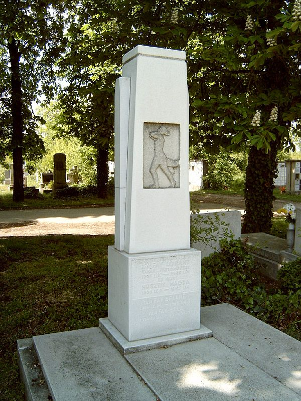 Fáy Lóránt sírja Budapesten. Új köztemető: 28-1/a-45/46. Csorba Géza (1892–1974) alkotása (1944)